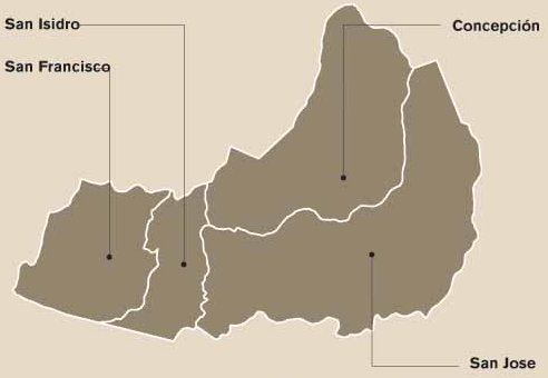 Mapa de los distritos del cantón de San Isidro, provincia de Heredia, Costa Rica.